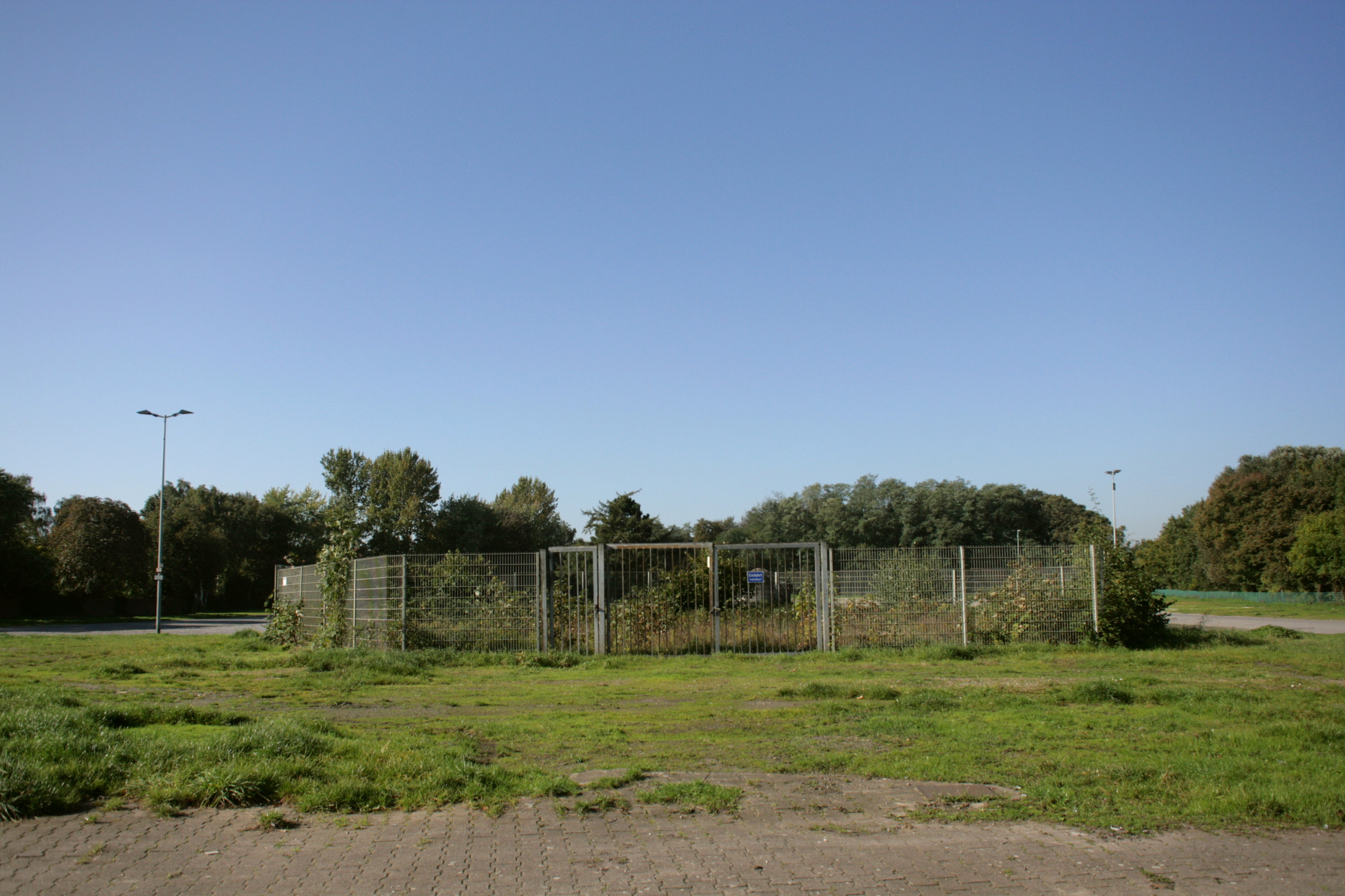 Unser Fritz Schacht 5, Cranger Kirmesplatz, Altcrange in Herne-Crange